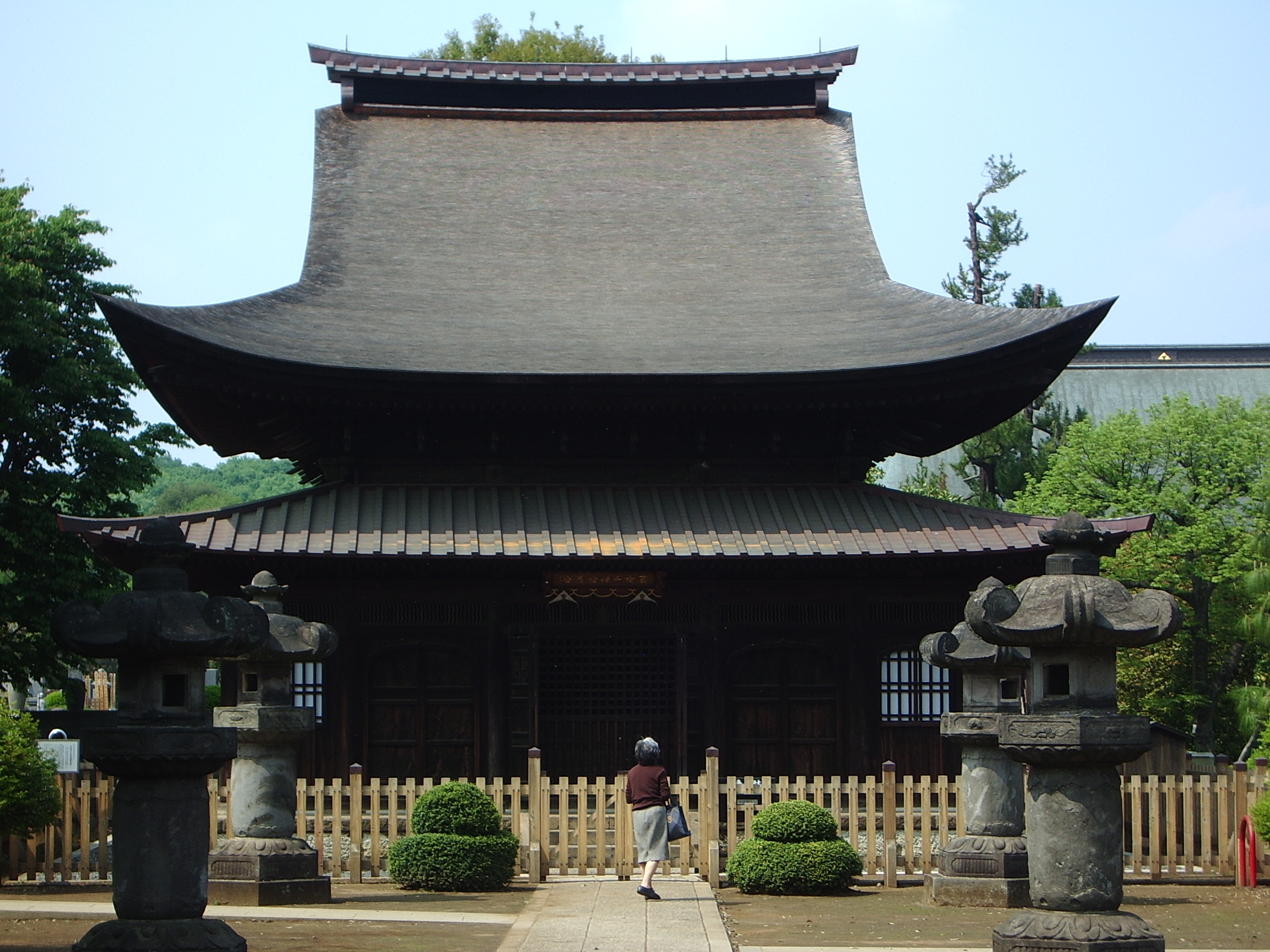 Jizō hall at Shofukuji — Higashimurayama, Tokyo